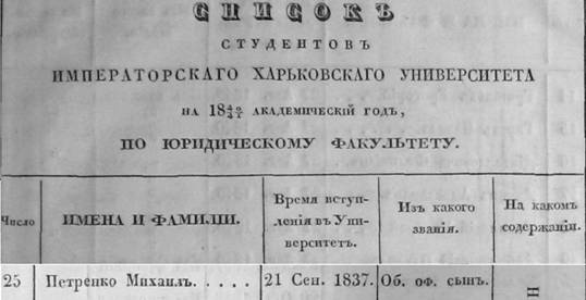 список студентів де згадано Михайла Петренка